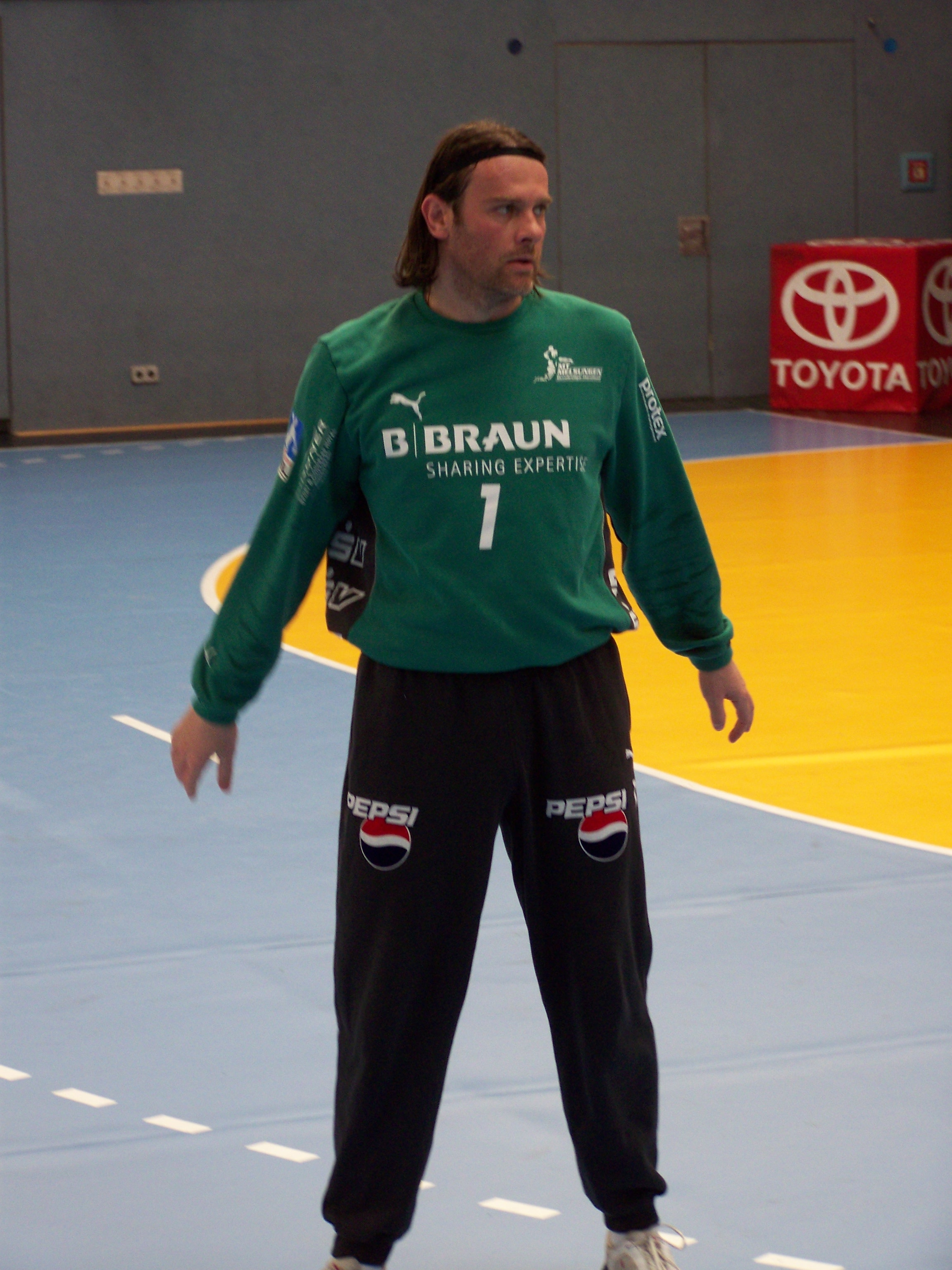 Der kroatische Handballspieler Mario Kelentrić beim Auswärtsspiel der MT Melsungen beim Stralsunder HV am 4. April 2009.